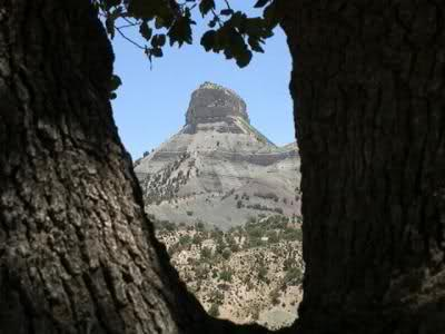 قلعه والی